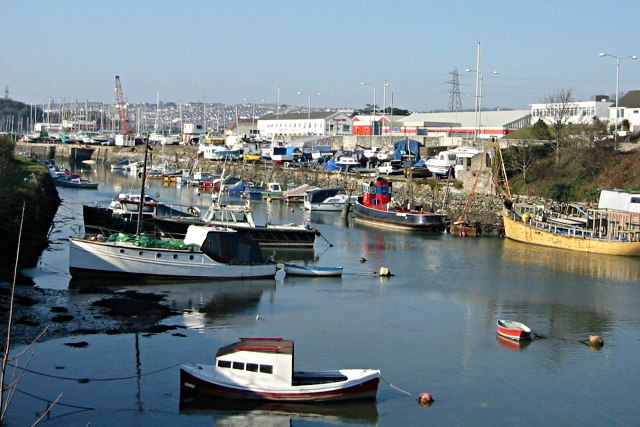 Pomphlett Lake